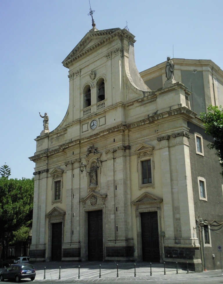 Prospetto della chiesa di Santa Barbara a Paternò